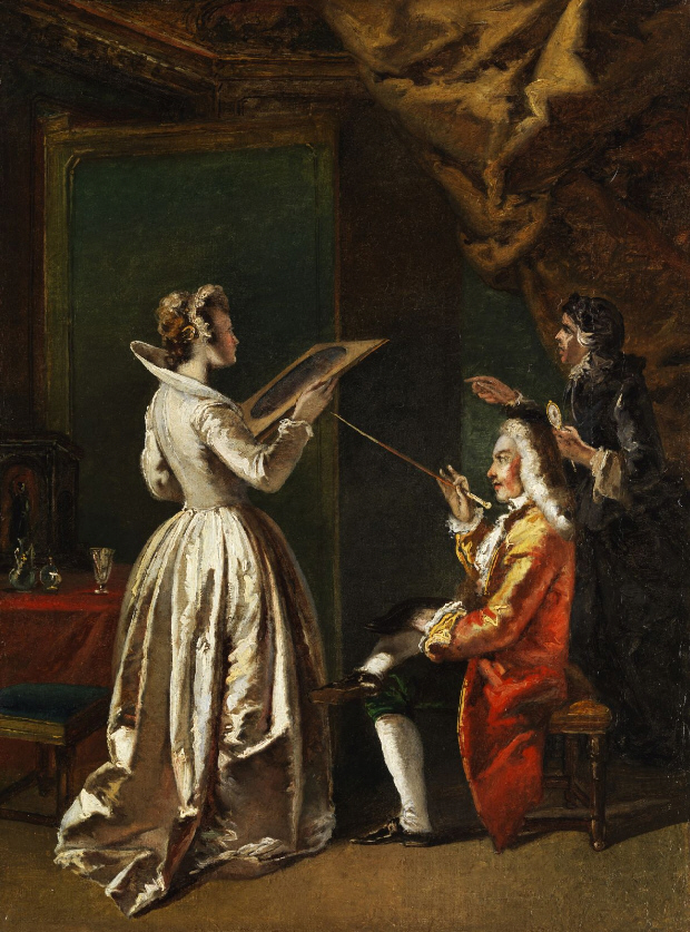 Junge Dame in Betrachtung eines Kunstwerks im Passepartout, Öl auf Leinwand, 50,5 x 37,5 cm.